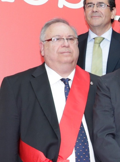 Imposición de la Medalla de la Comunidad de Madrid y Condecoraciones de la Orden del 2 de a los premiados: Medalla de la Comunidad de Madrid, en su categoría de Oro; Alejandro Sanz y Javier Fernández. Medalla de Plata de la Comunidad de Madrid; Cuerpo de Bomberos de la Comunidad de Madrid y Jefatura Superior de Policía de Madrid. Orden del Dos de Mayo; Lorenzo Silva y doctor Jesús Vaquero, en el grado de Gran Cruz; los seis Institutos de Enseñanza Secundaria históricos de Madrid (Cervantes, Cardenal Cisneros, Isabel la Católica, Ramiro de Maeztu, Lope de Vega y San Isidro) y la Unidad de Trastornos del Comportamiento Alimentario del Hospital Infantil Universitario Niño Jesús, en el grado de Encomienda de Número. La condecoración en el grado de Cruz será para la Red Natura 2000 y para la empresa Talgo.